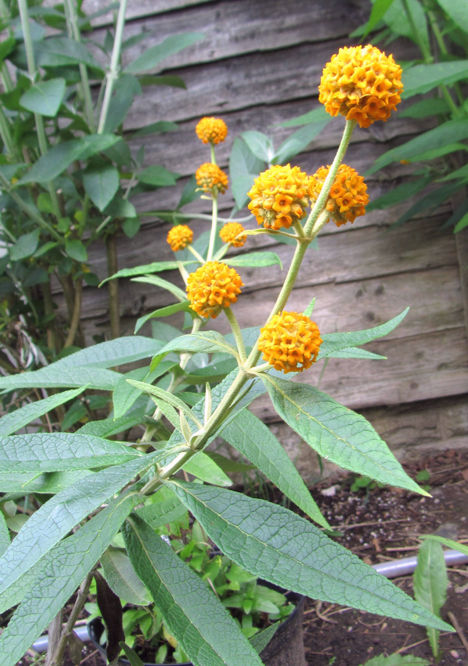 Buddleja araucana flower June